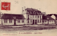 Ecole et Mairie de Chalinargues